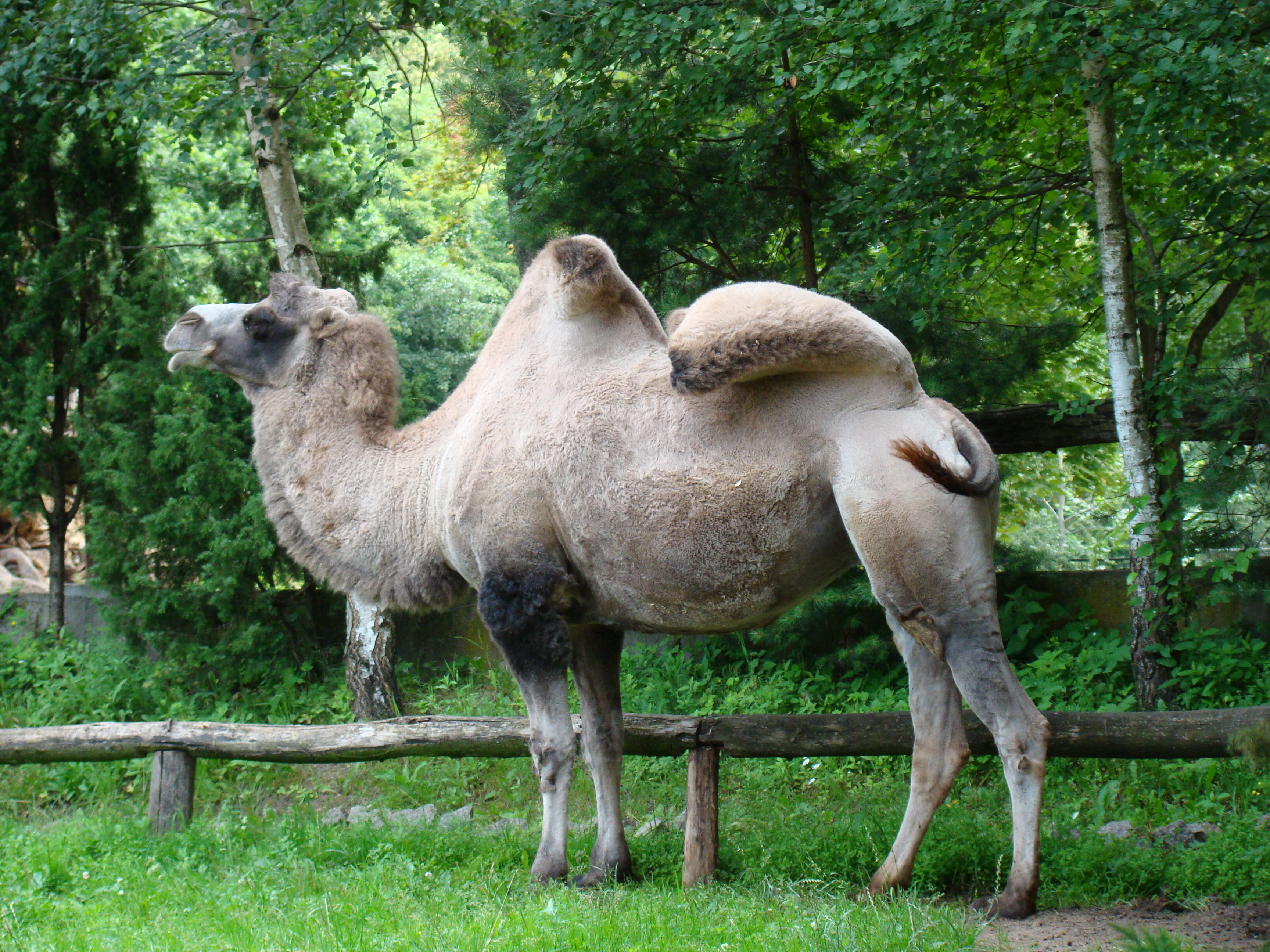 Dvikupris kupranugaris Kauno zoologijos sode